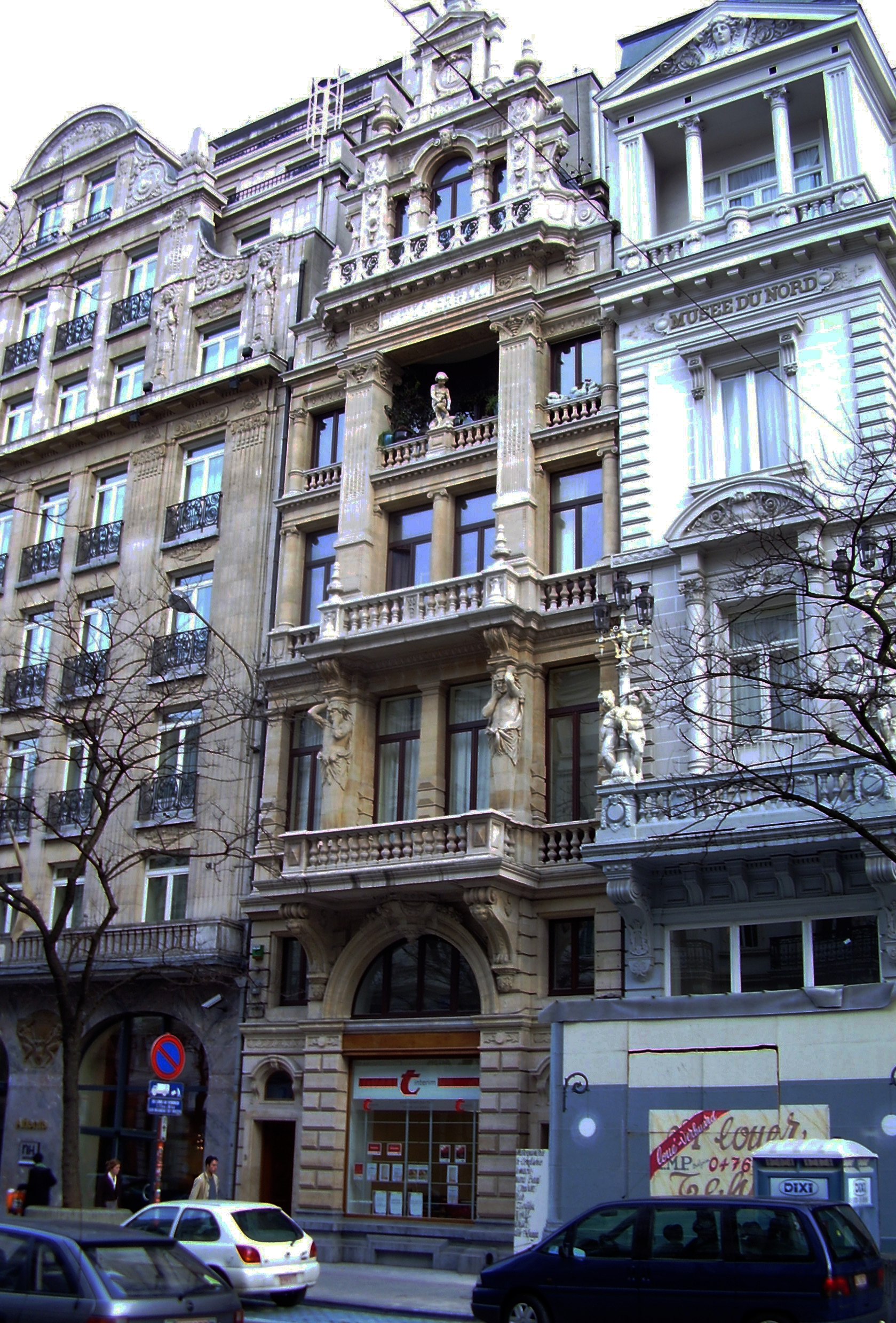 Maison « Hier ist in den kater en de kat », boulevard du Nord (bld.Adolphe Max), architecte Henri Beyaert - Bruxelles , 1er prix du concours d'architecture de 1876